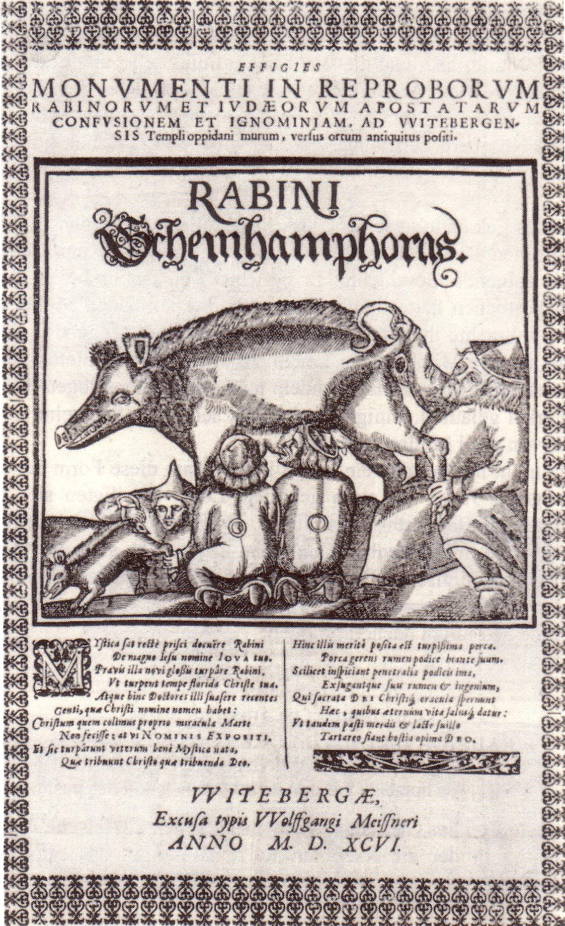 Einblattdruck mit Darstellung der Wittenberger Judensau